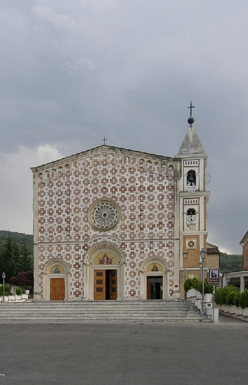 Basilica Volto Santo di Manoppello